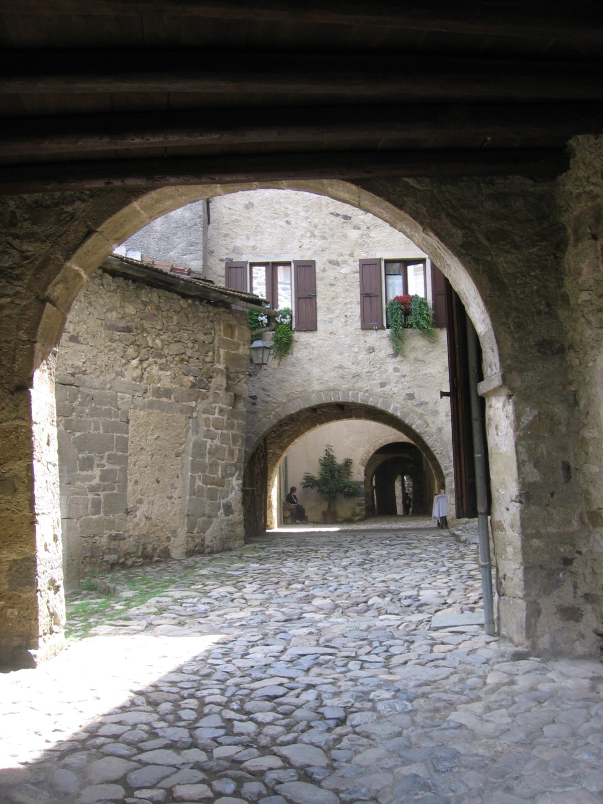 Cornello dei Tasso, Camerata Cornello, Bergamo, Italy